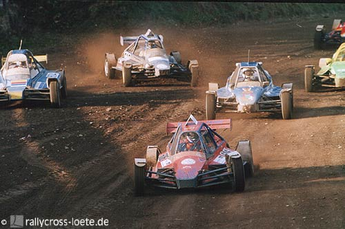 Autocross: Finale der Spezial-Crossfahrzeuge beim DMSB-DM-Finale in Weigsdorf-Köblitz 2004 Michael Höse (webmaster von rallycross-loete.de) hat die Bilder eingestellt, ich denke das diese 3 Bilder am besten den Tourenwagen und Spezialcross-Charakter des Autocross-Sports trffen - leider fhelen mir gute Bilder der Super/Spezialtourenwagen.